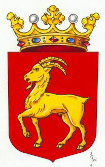 Wapen van de gemeente Boxmeer, Noord-Brabant